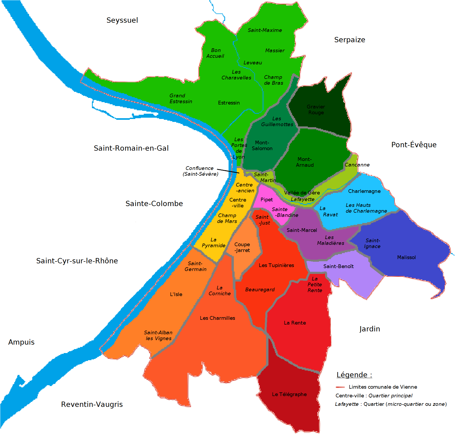 Plan non-officiel de la ville de Vienne découpée en quartiers principaux et en quartiers plus petits, réalisé selon les panneaux de direction de la ville de Vienne, les cartes IGN 3032 E et 3033 E et selon le plan 2011 de la ville de Vienne.